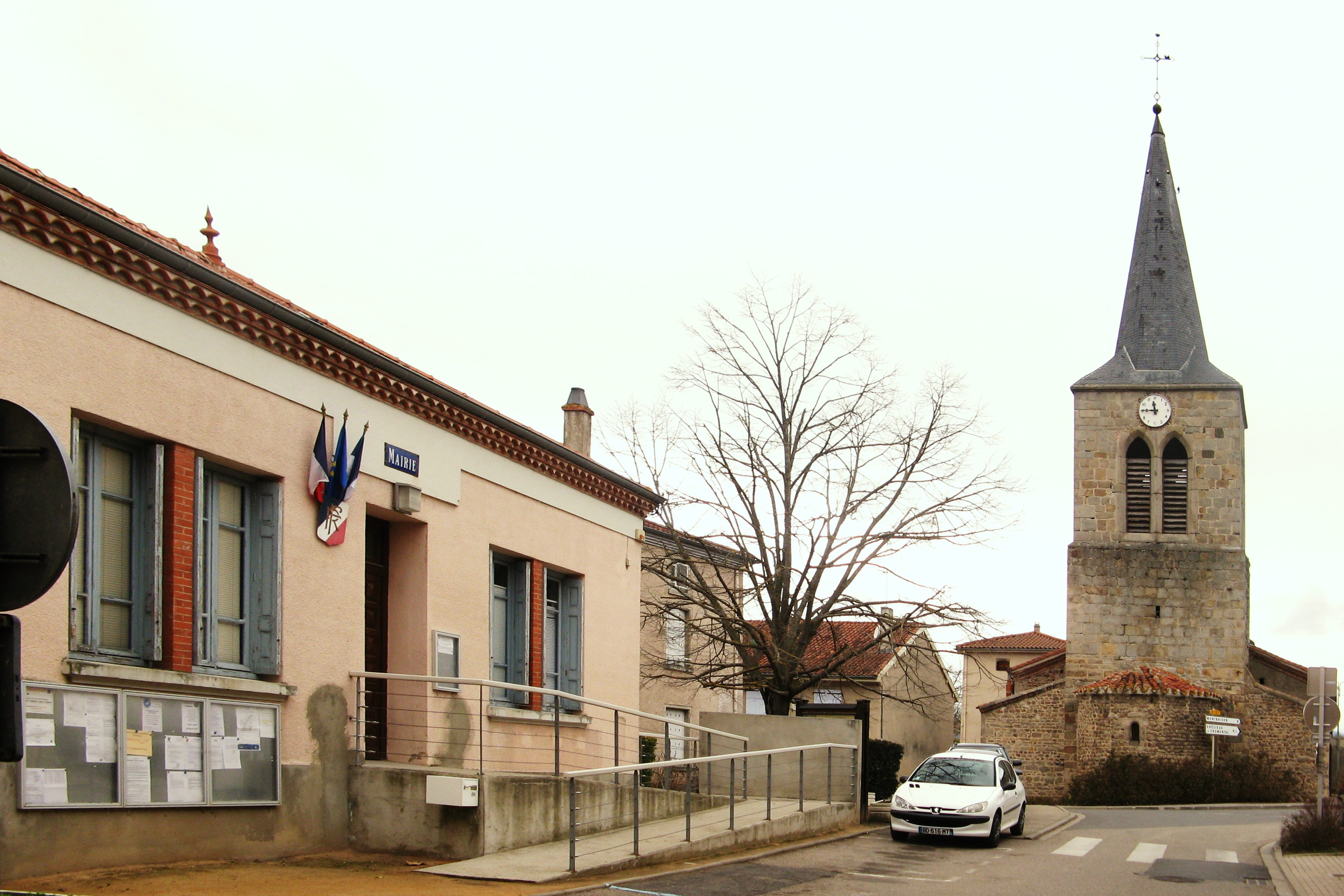 Précieux (Loire) : mairie